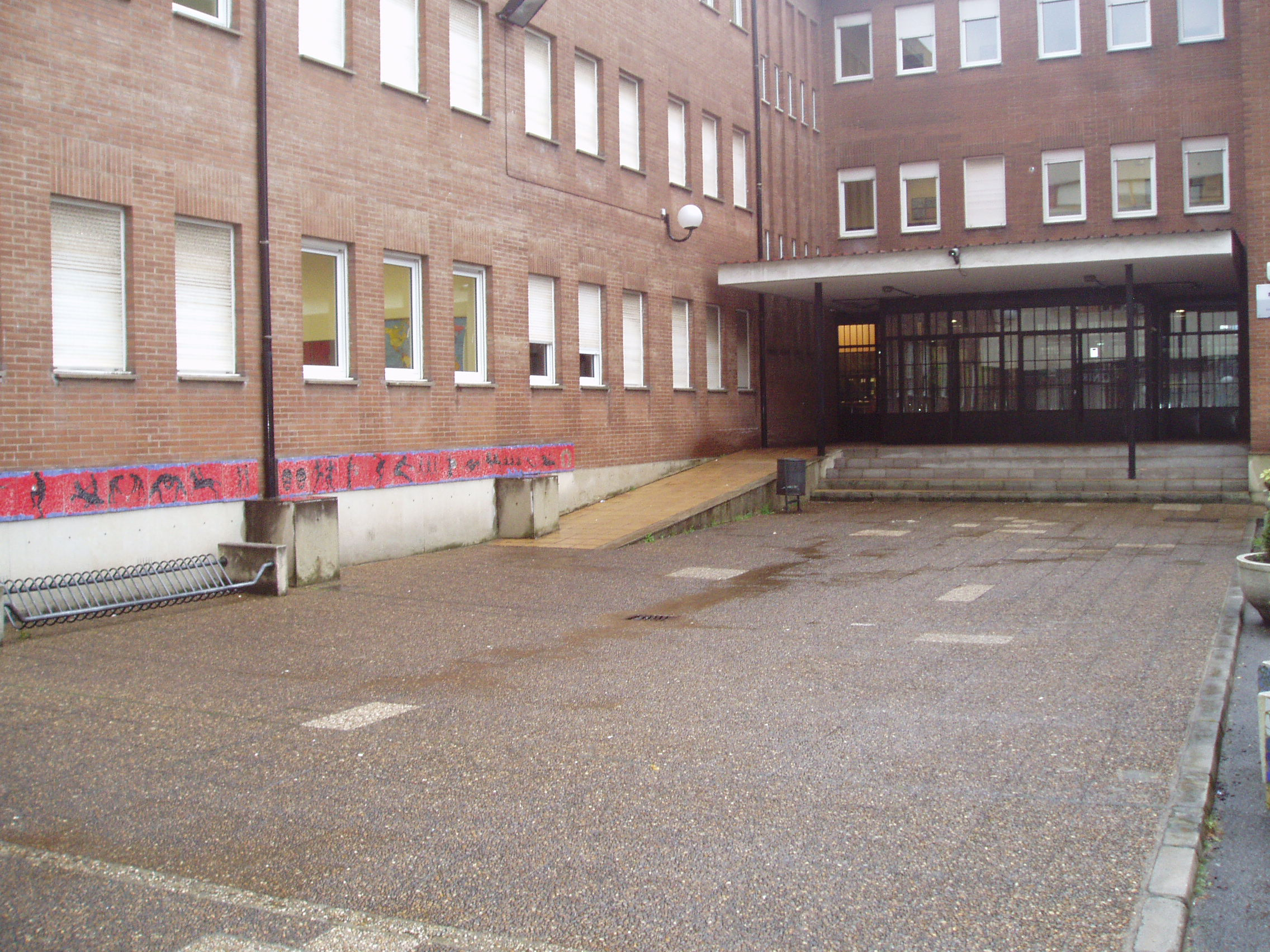 Imagen del ies Emilio Alarcos en el barrio de Moreda de Gijón Asturias